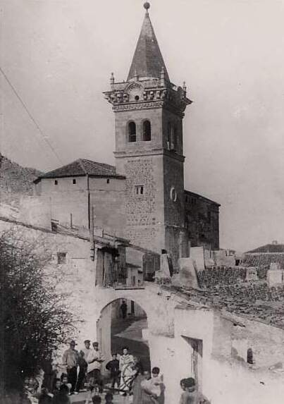 Vista de la Iglesia Vieja y su arco.